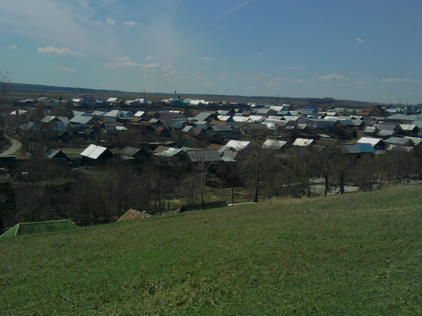 Фотография села